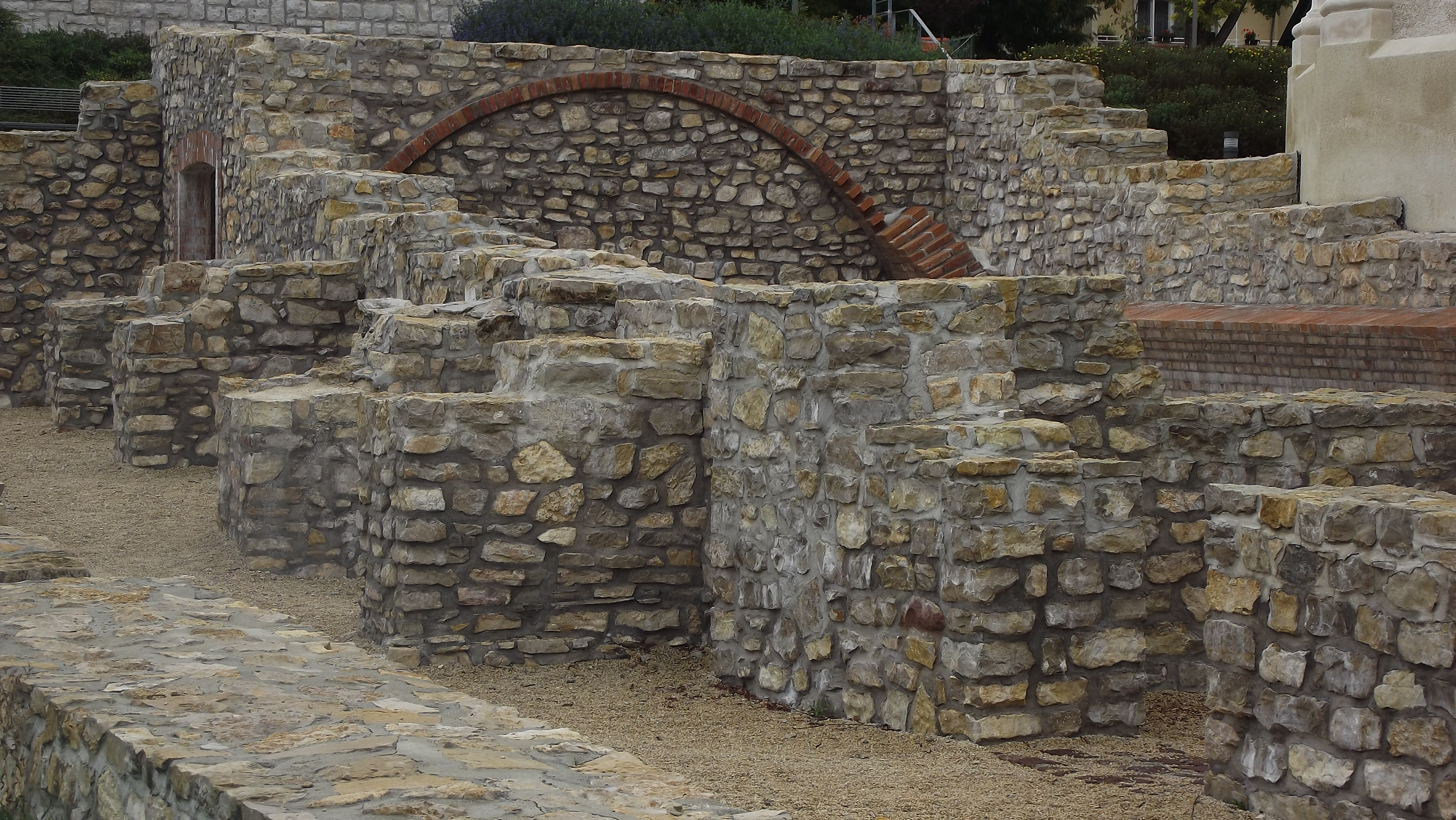 Görögkeleti apácák kolostora. (másnéven Veszprémvölgyi apácák kolostorának romjai) This is a photo of a monument in Hungary. Identifier: 10713